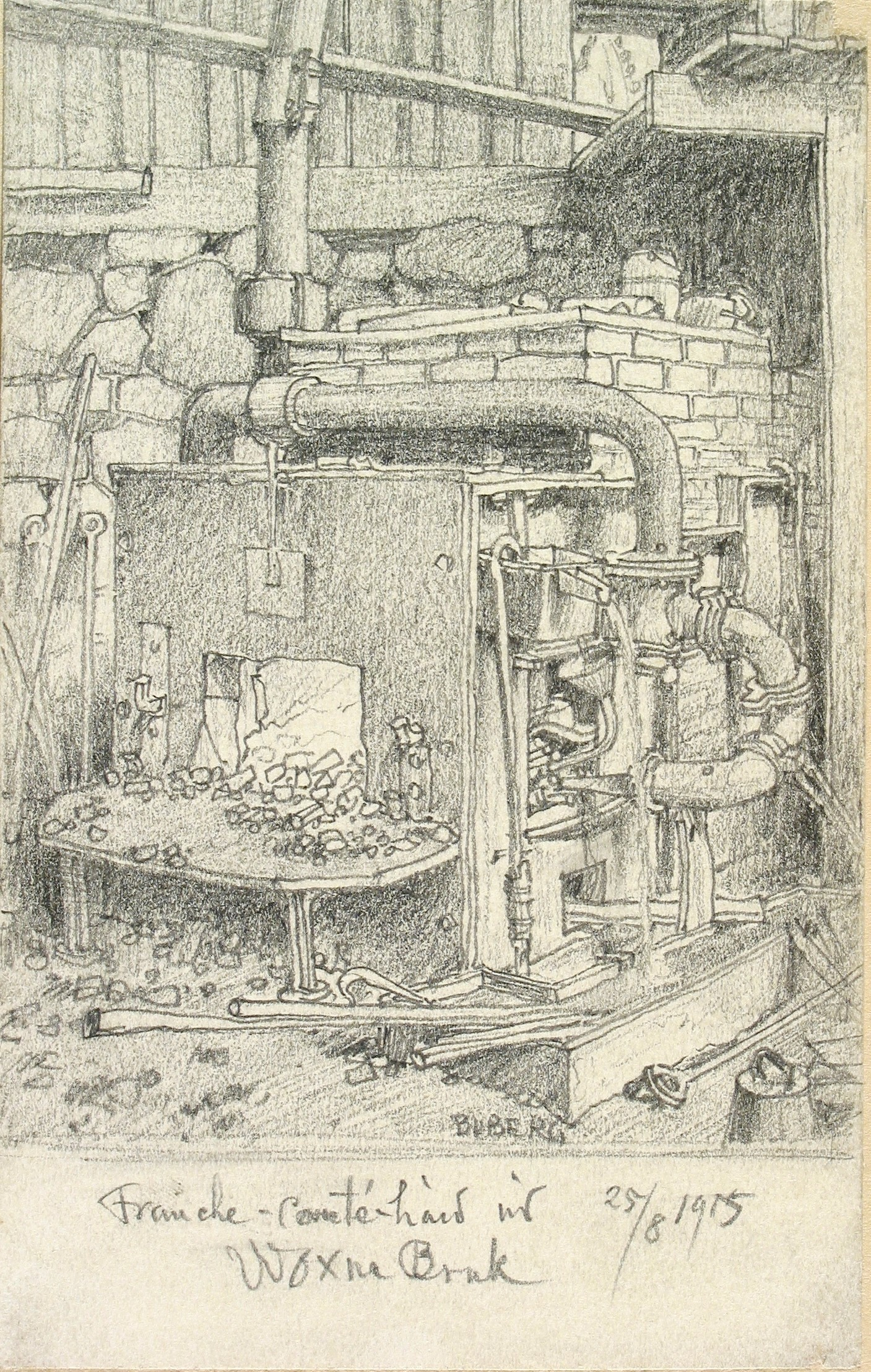 Blyertsteckning av Ferdinand Boberg som underlag till hans arbete "Svenska bilder vid 1900-talets början"